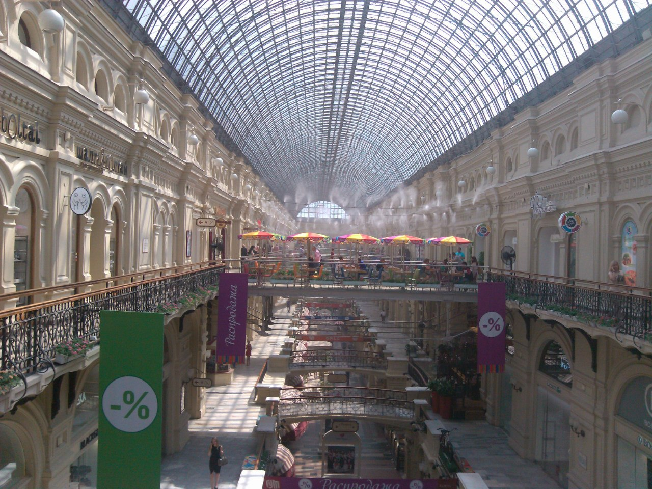 ГУМ, третий этаж